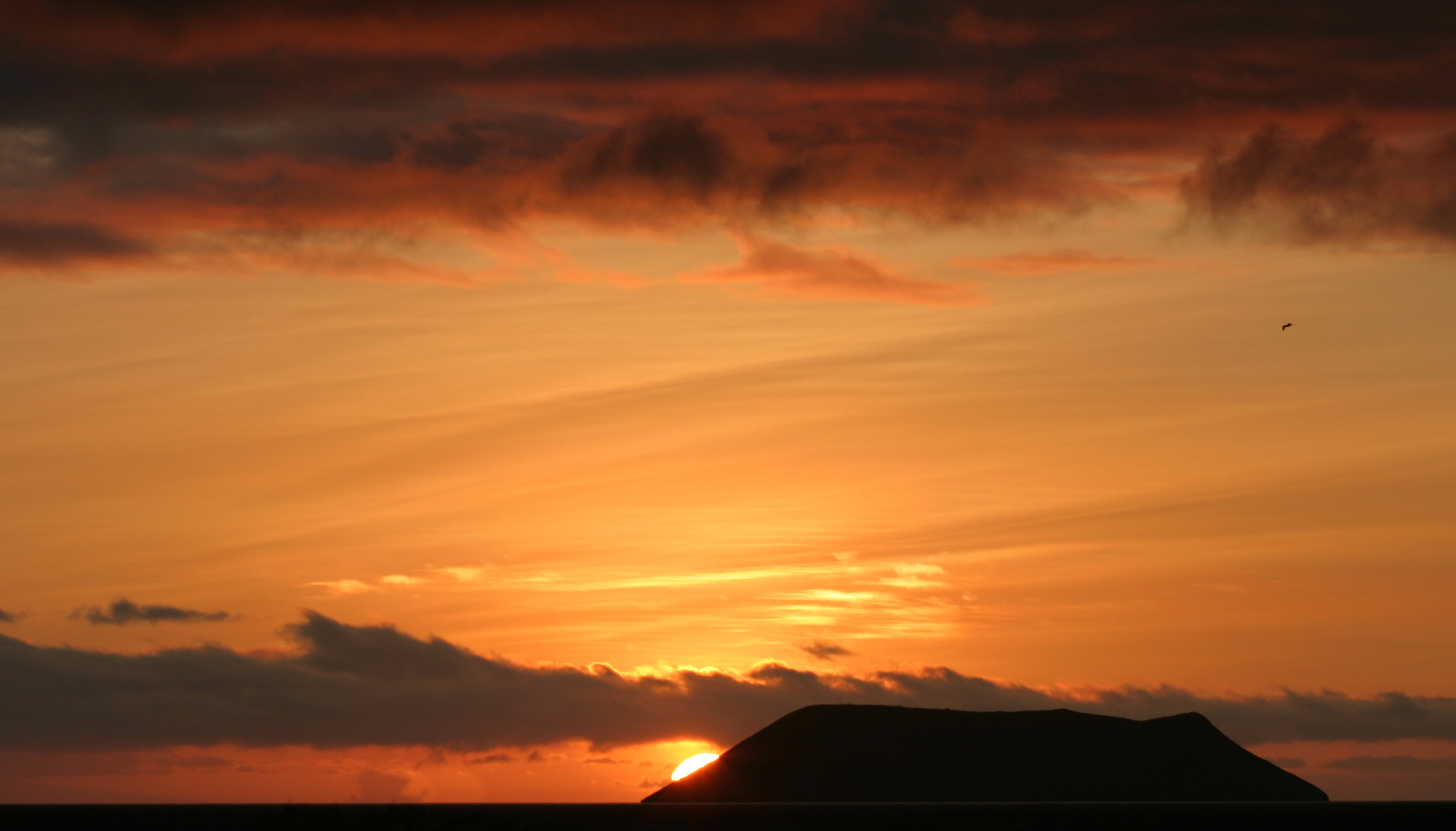 Sunset in Galapagos 2003